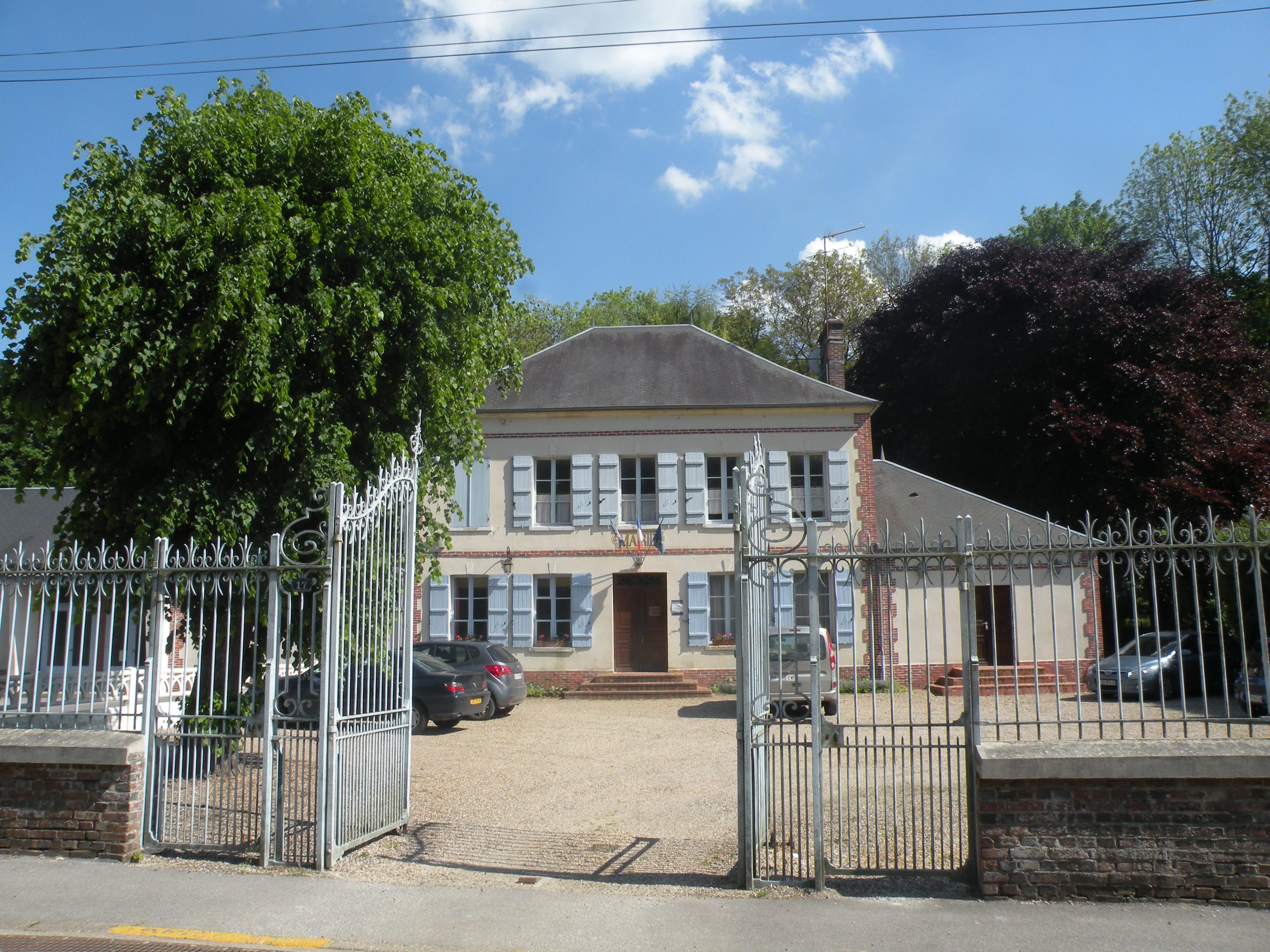 Labosse mairie